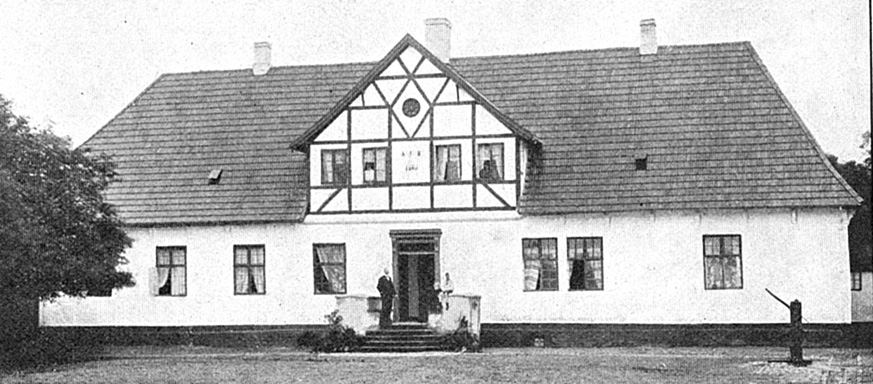 Skovgaarde er en gammel hovedgård, som nævnes første gang i 1466. Skovgaarde ligger i Søby Sogn, Båg Herred, Assens Kommune. Hovedbygningen er opført i 1721 og ombygget 1863.ds til 1980. Gården ligger i Stubberup Sogn, Bjerge Herred, Kerteminde Kommune.